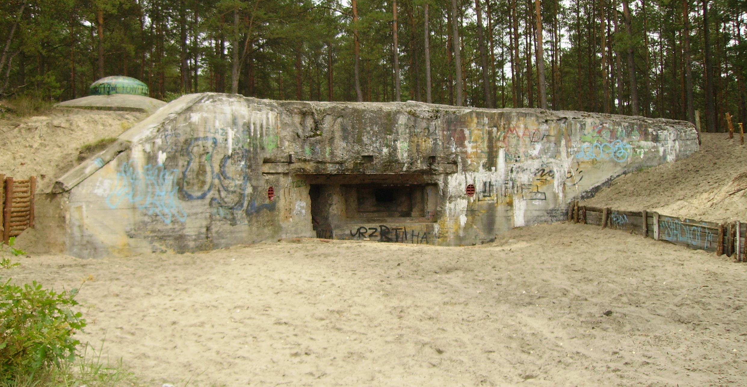 Dąbrowiecka Góra - Regelbau 120a - Widok ogólny